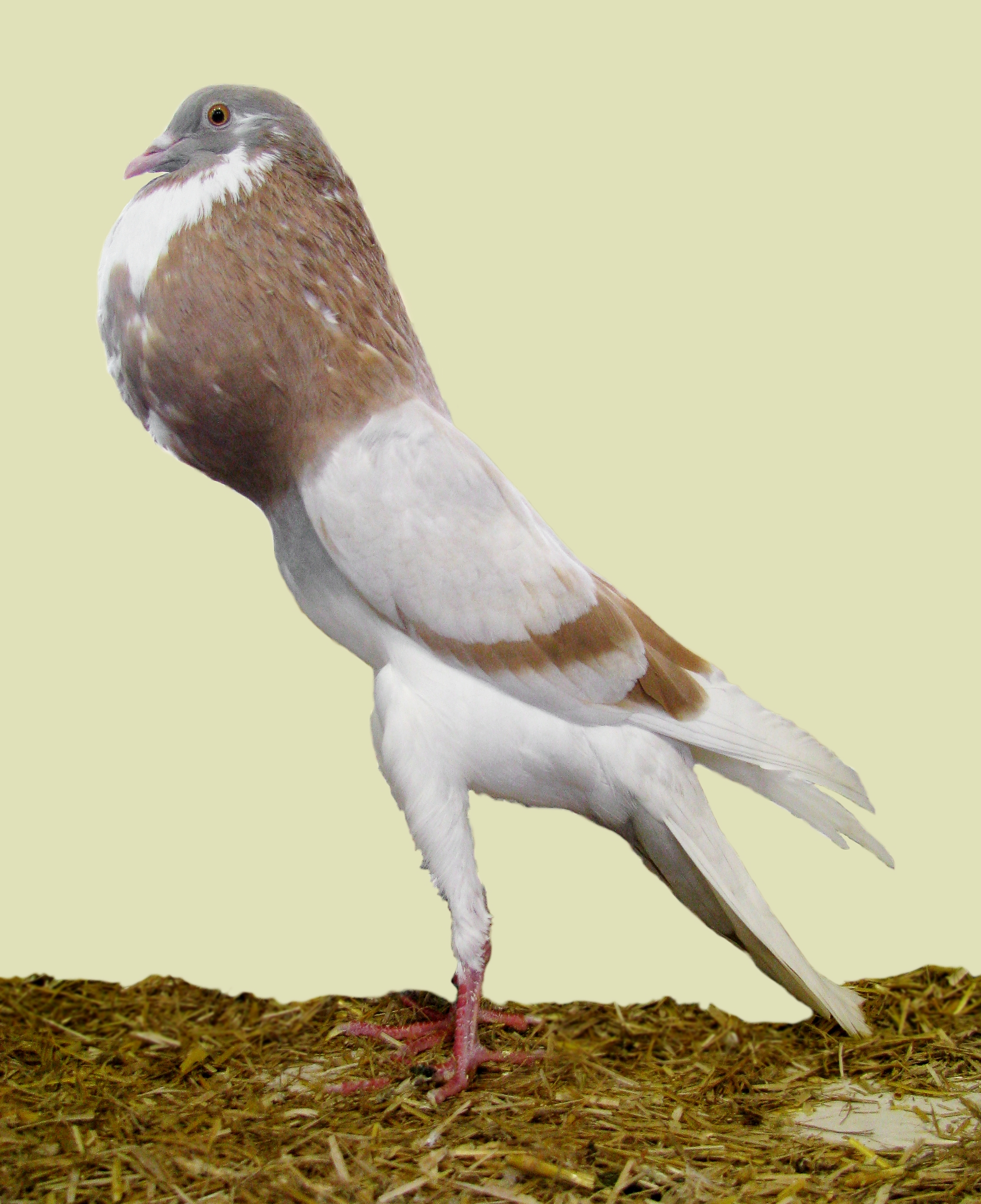 RGZV Frankenthal e.V. – Lokalschau in der Turnhalle Frankenthal vom 22. bis 23. November 2014 0,1 Französische Kröpfer, gelbfahlgeherzt, sg93